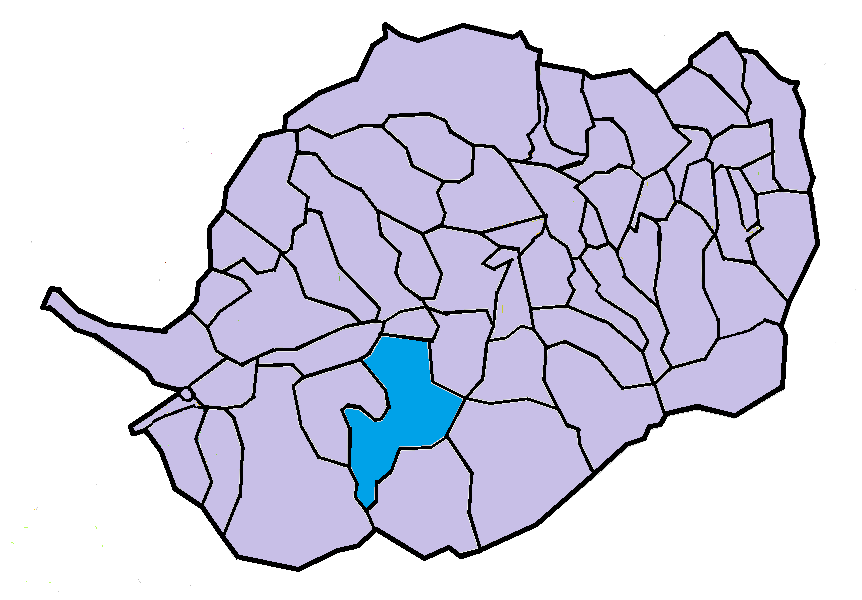 Nyer en el Conflent, a partir del mapa municipal del Conflent de lliure disposició adaptat al Nomenclàtor toponímic aprovat el 2007